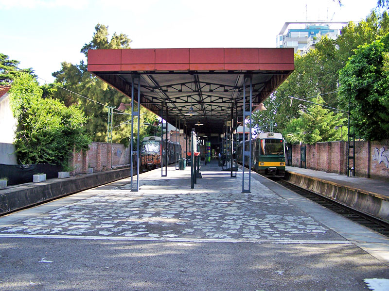 Estación Maipú